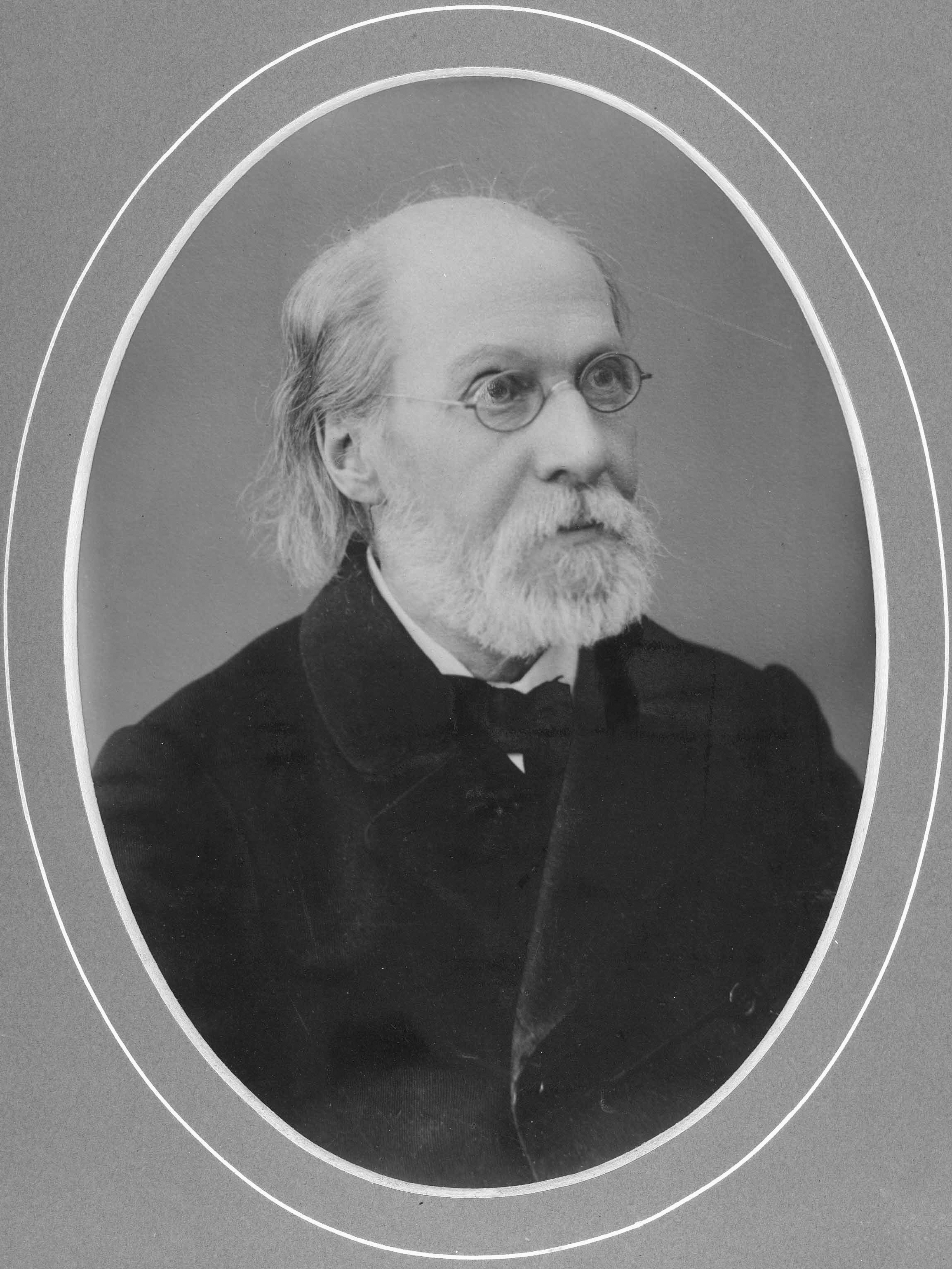 Никола́й Петро́вич Ва́гнер (18 [30] июля 1829, Богословский завод Верхотурского уезда Пермской губернии (ныне Карпинск Свердловской области) — 21 марта [3 апреля] 1907, Санкт-Петербург) — русский зоолог и писатель.